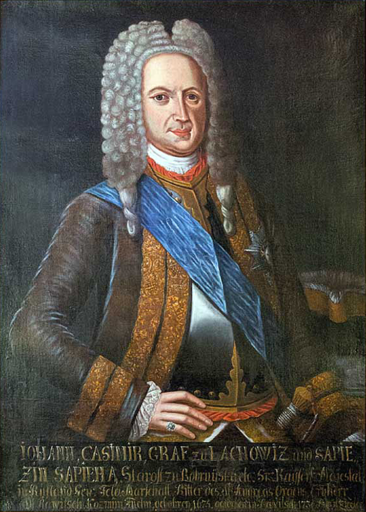 Беларуская (тарашкевіца): Партрэт Яна Казімера Сапегі (Jan Kazimier Sapieha) гербу «Ліс» (каля 1670 — 1730), дзяржаўнага і вайсковага дзеяча Вялікага Княства Літоўскага, гетмана вялікага літоўскага, генэрал-фэльдмаршала расейскай службы, генэрал-губэрнатара Пецярбургу.